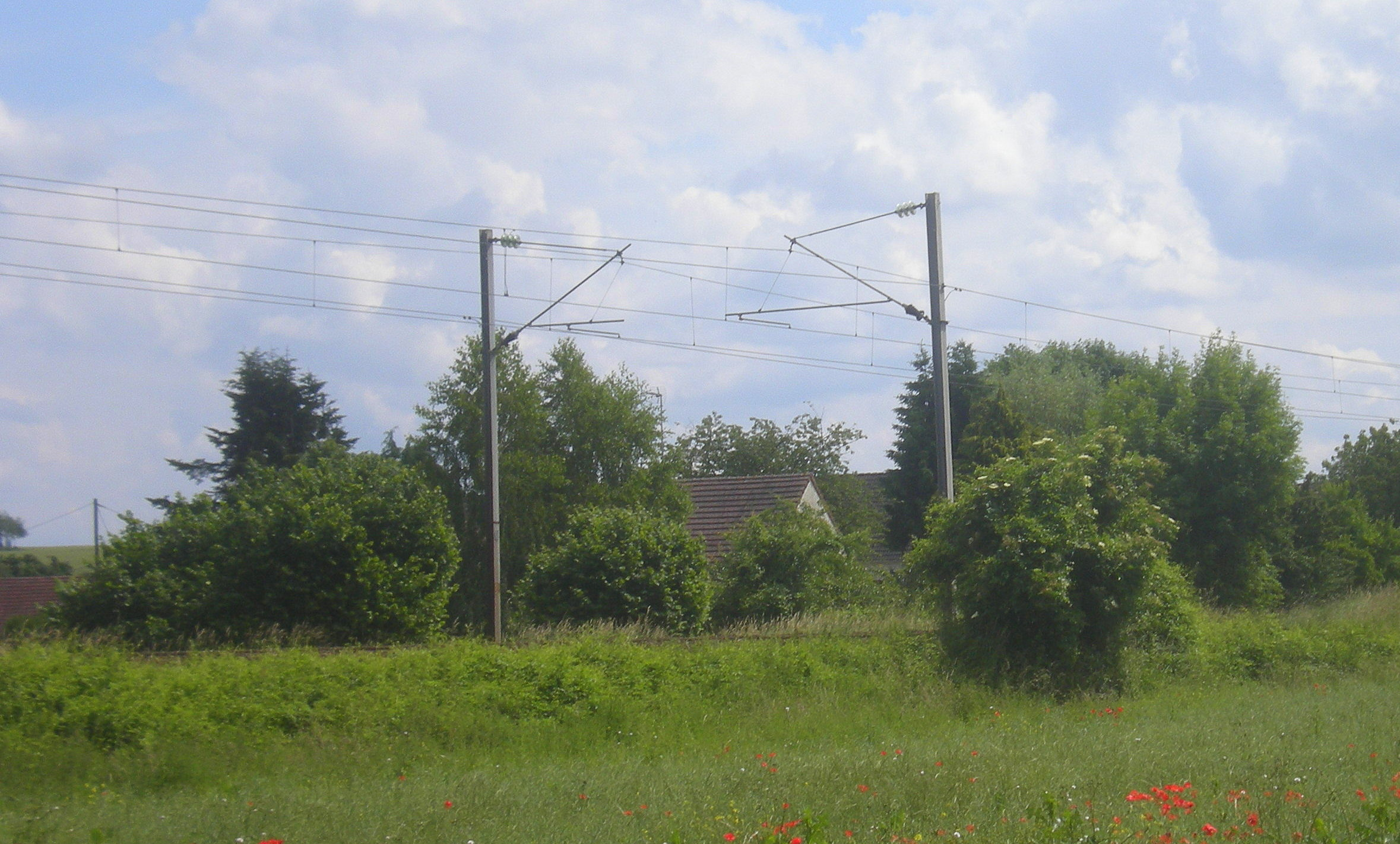 La ligne de Paris-Nord à Lille depuis la rue d'Étouy à Airion (60).